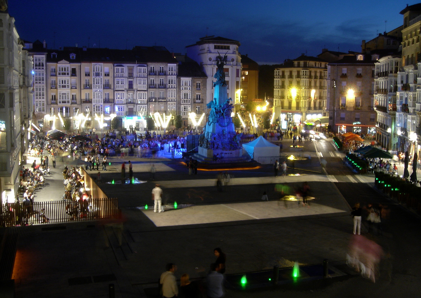 Andre Maria Zuriaren plaza (Gasteiz)